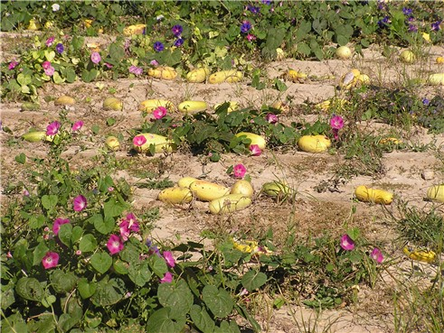 squash eigen foto